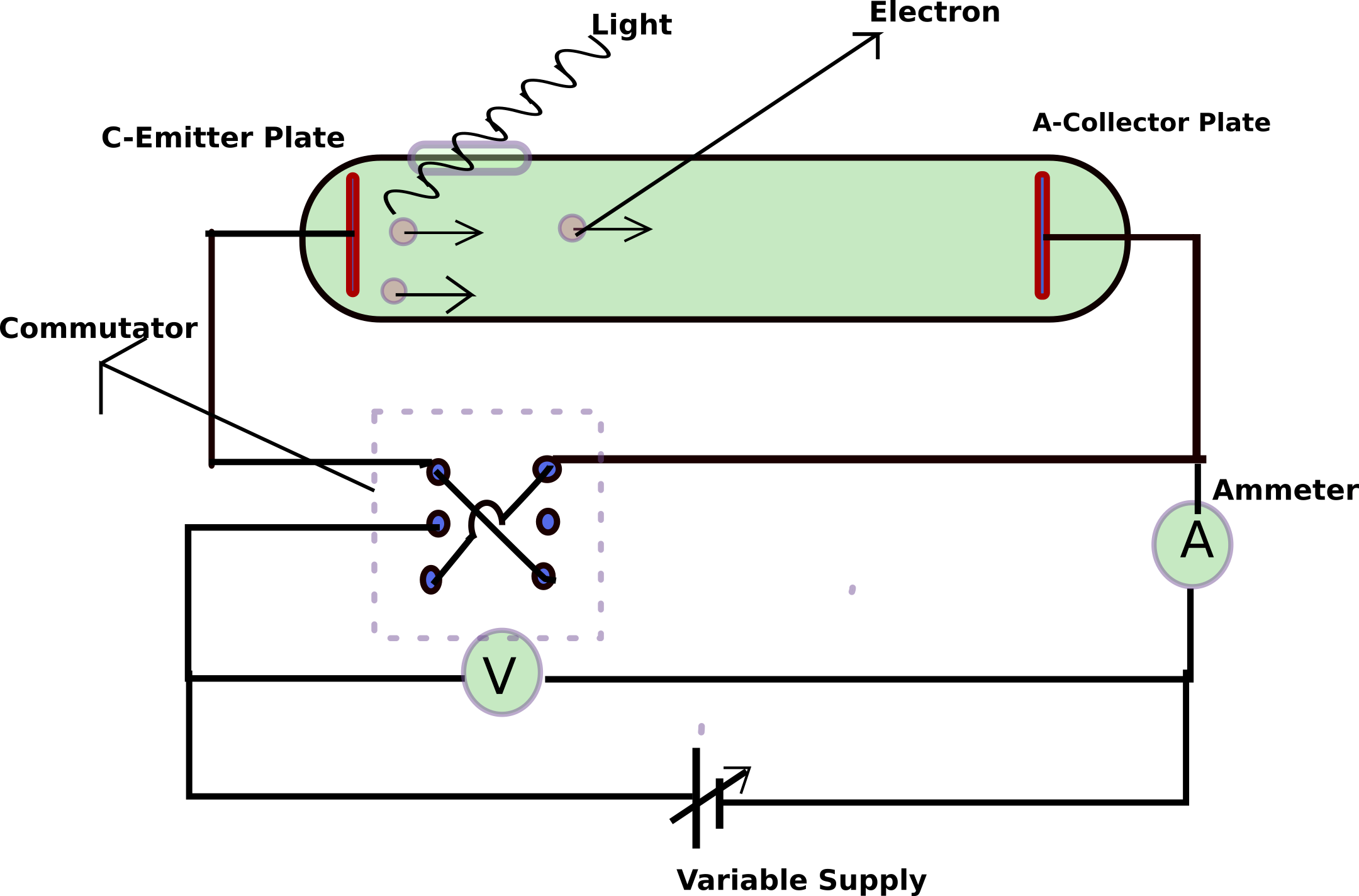 ഫോട്ടോ ഇലക്ട്രിക്ക് പ്രതിഭാസം- പരീക്ഷണത്തിന്റെ രേഖാചിത്രം